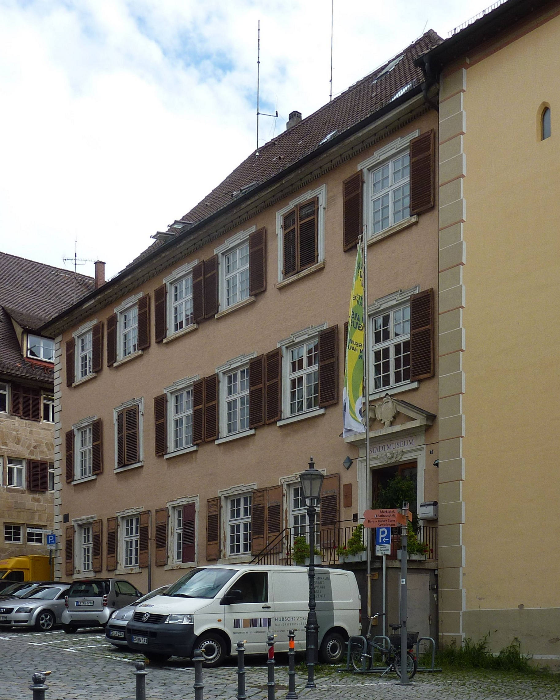 Hafenmarkt 7 in Esslingen, Fassade nach Westen